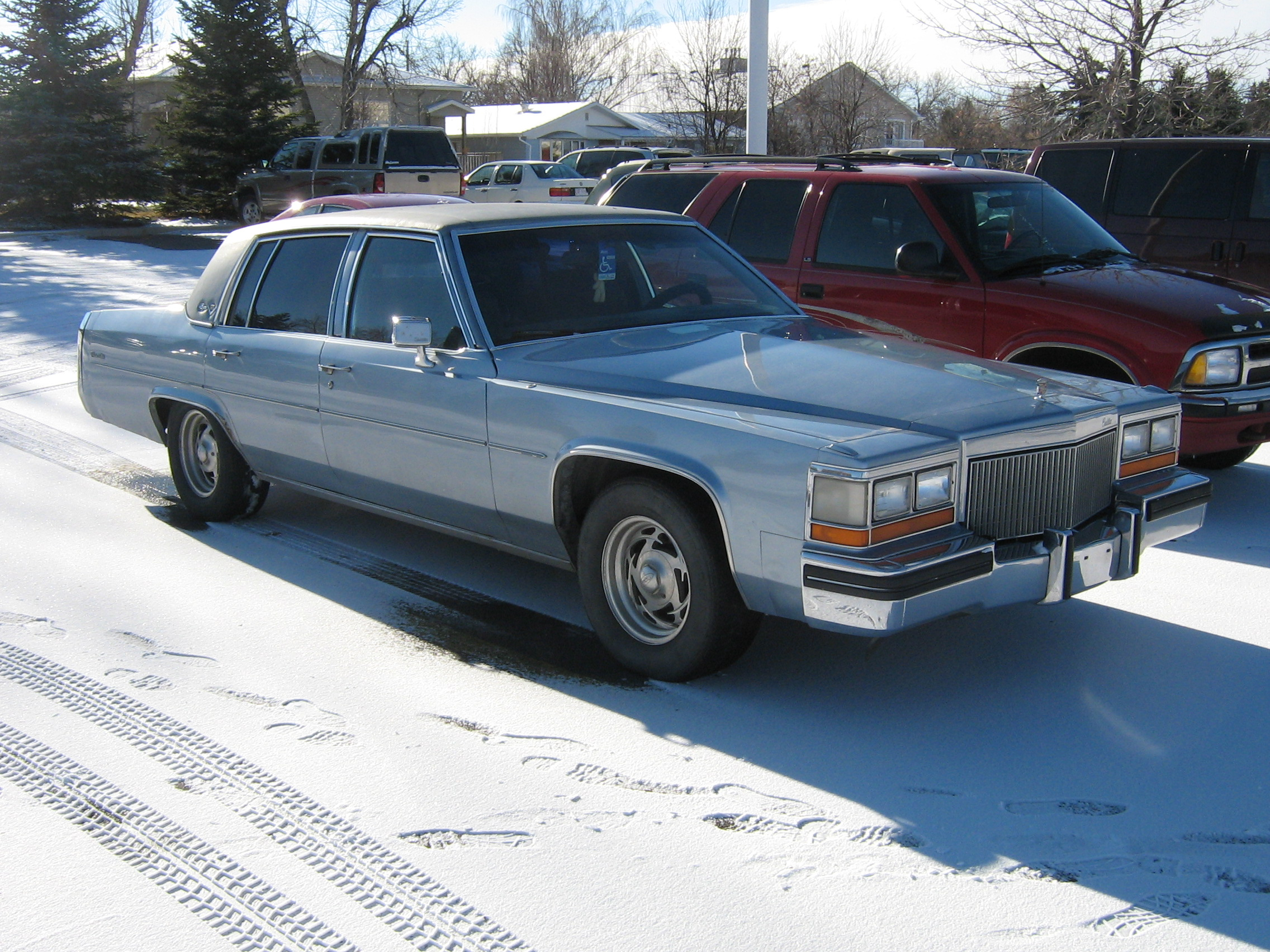 Cadillac